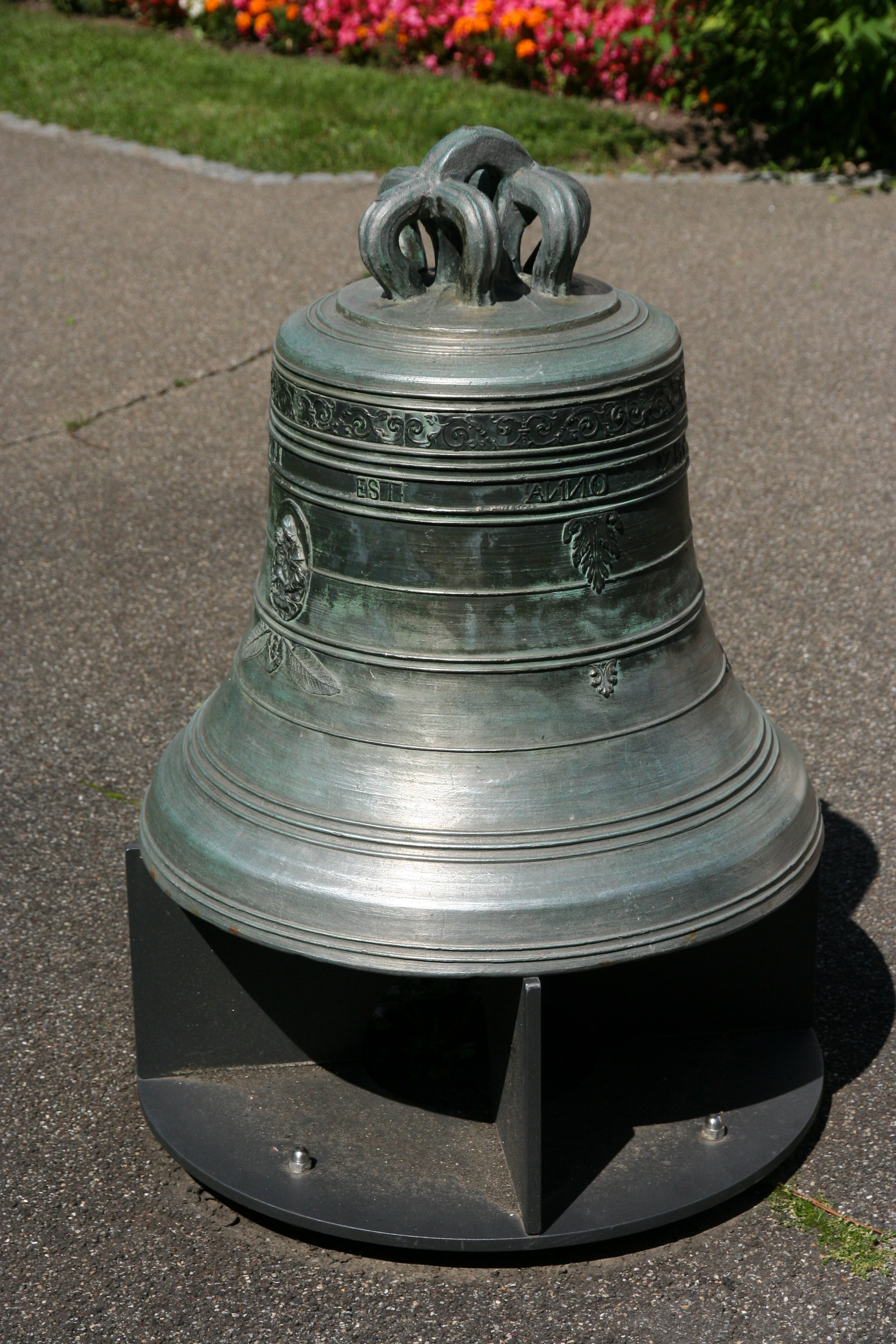 Römisch-katholische Pfarrkirche St. Josef Schlieren, historische Glocke